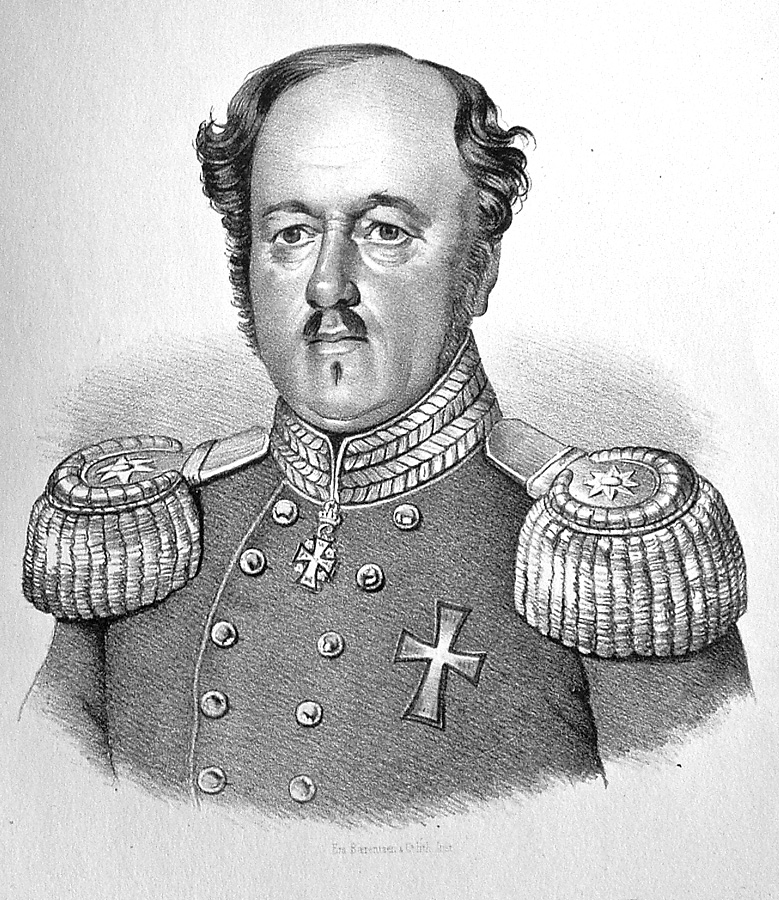 Frederik Rubeck Henrik von Bülow (4. februar 1791 - 16. juni 1858) Generalløjtnant og øverstkomanderende under udfaldet fra Fredericia under Treårskrigen (1848 - 1850).